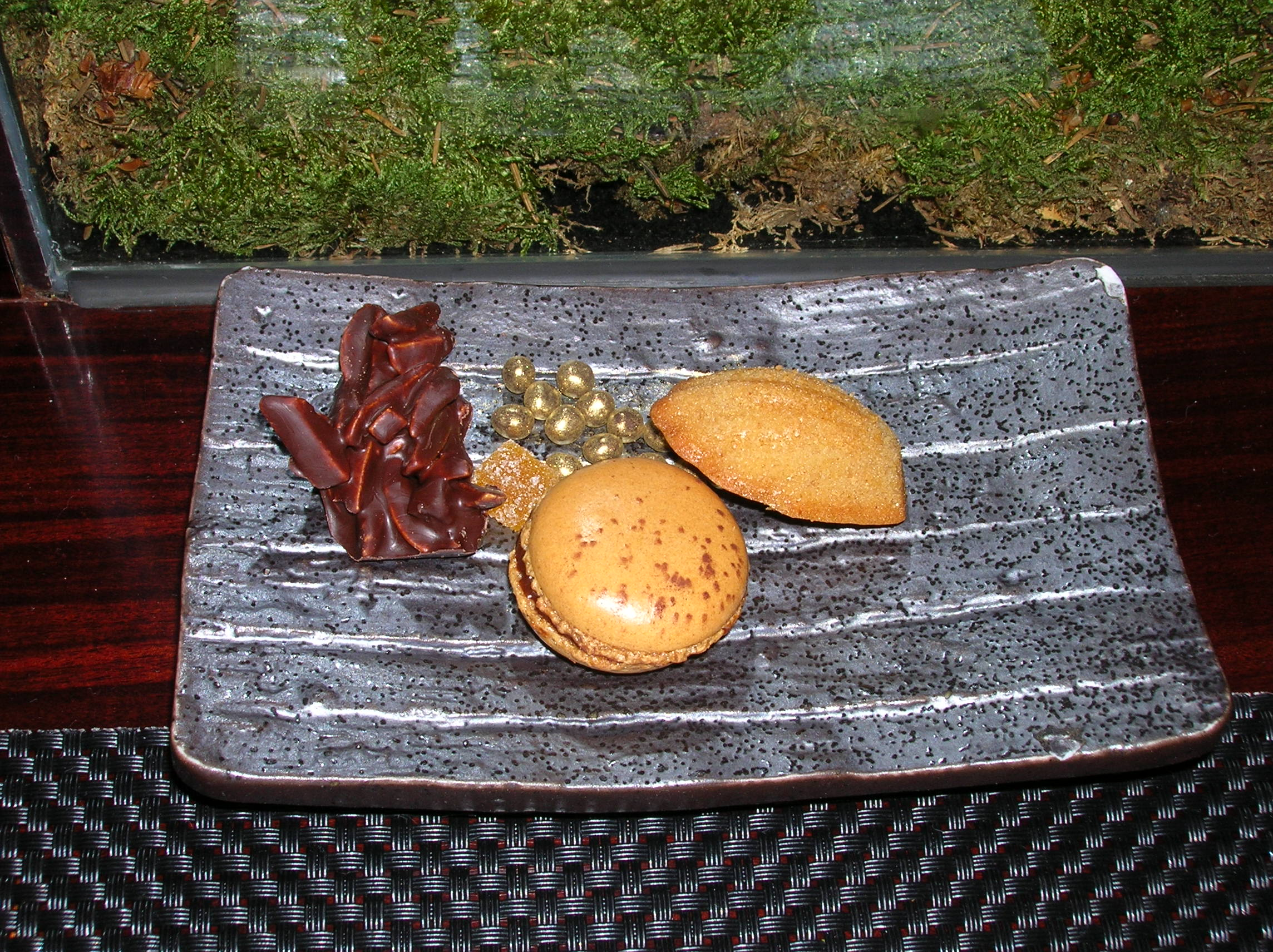 קינוח באטליה של רובישון בהונג קונג